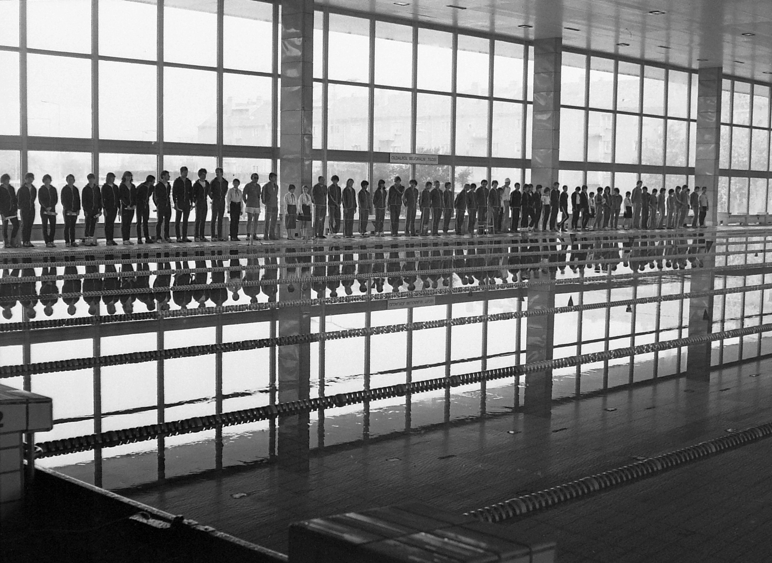 Sportuszoda. Location: Hungary, Dunaújváros Tags: swimming pool Title: Sportuszoda.